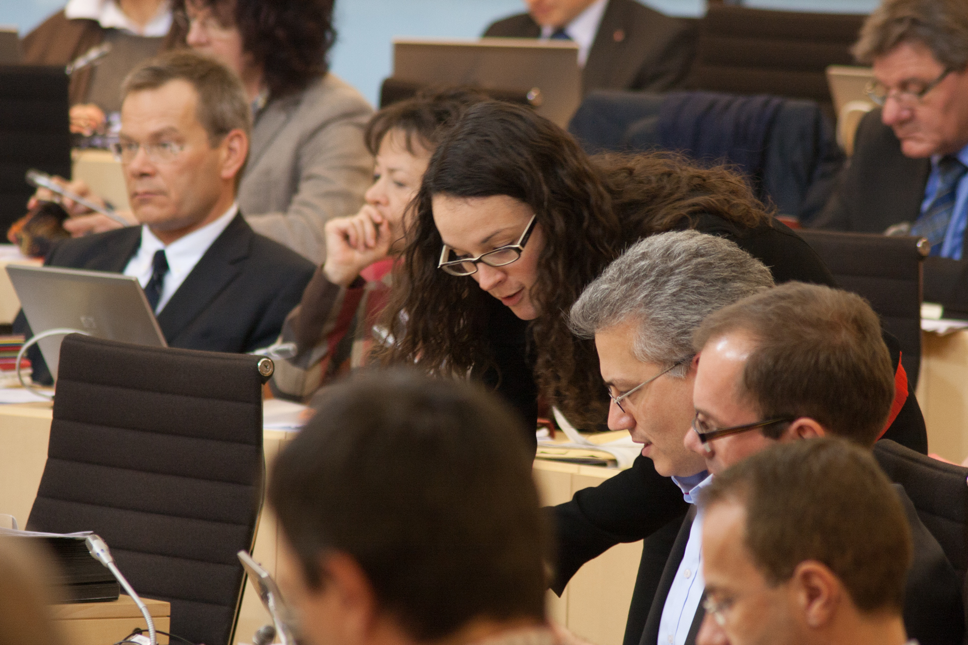 Tarek Al-Wazir und Angela Dorn im Hessischen Landtag während einer Debatte zur Klage gegen den Länderfinanzausgleich